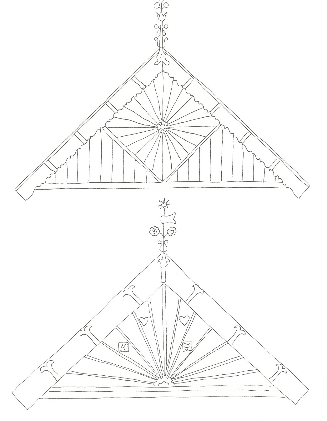 Napsugárdíszes házhomlokzatok Püspökladányból